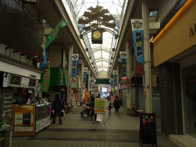 久里浜商店街黒船仲通りを撮影。